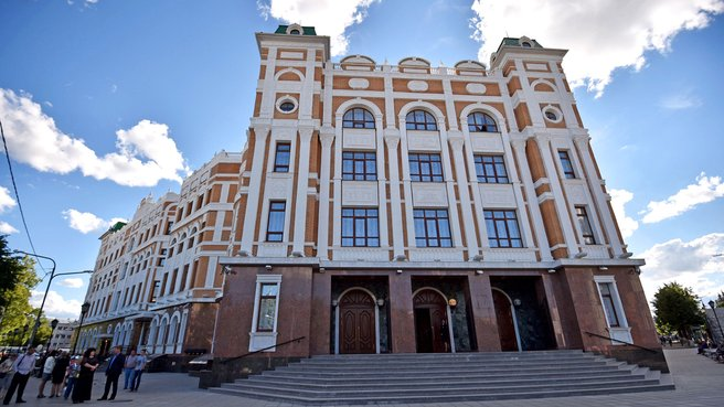 Новое здание Марийского государственного театра оперы и балета имени Эрика Сапаева